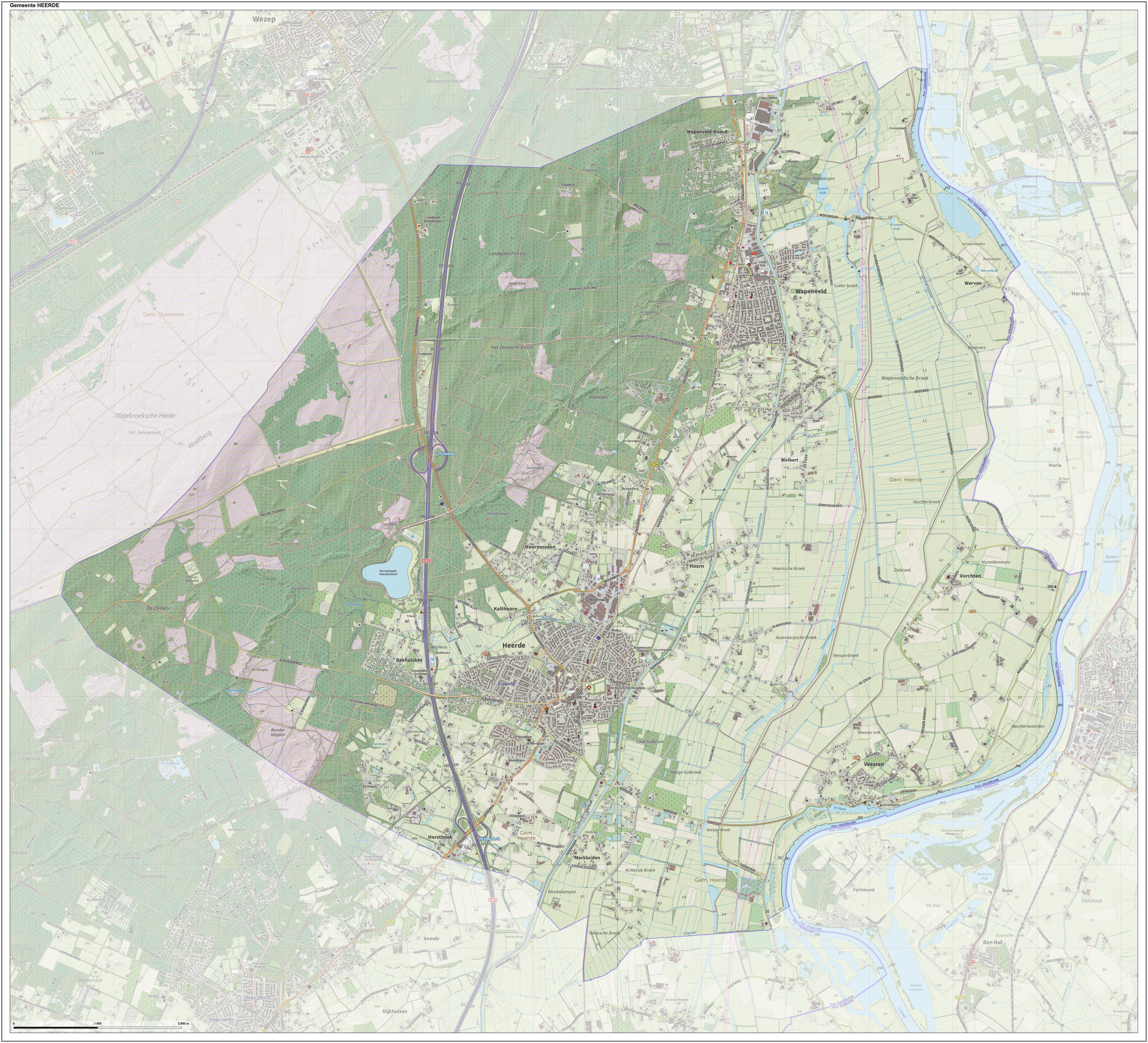 Topografische gemeentekaart. Resolutie: 400 pixels/km. Kaartbeeld samengesteld uit de open geodata van de Top10NL en Top25namen (Kadaster), Creative Commons-BY licentie. Gebouwvlakken uit open geodata BAG extract. Wegen uit de OpenStreetMap, OpenStreetMap community. Reliëfschaduw uit de Actuele Hoogtekaart AHN2. Samenstelling en kleurenschema: Jan-Willem van Aalst, met QGIS. Zie ook de Legenda.